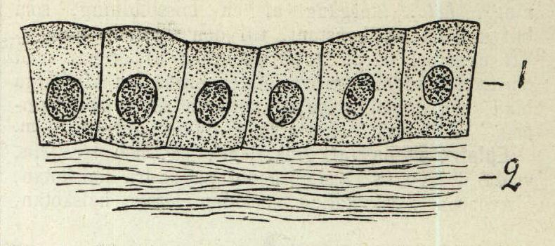 Fig. 1. Slemhinna med enkellagrigt epitel. 1 epitel-celler; 2 slemhinnans bindväf.